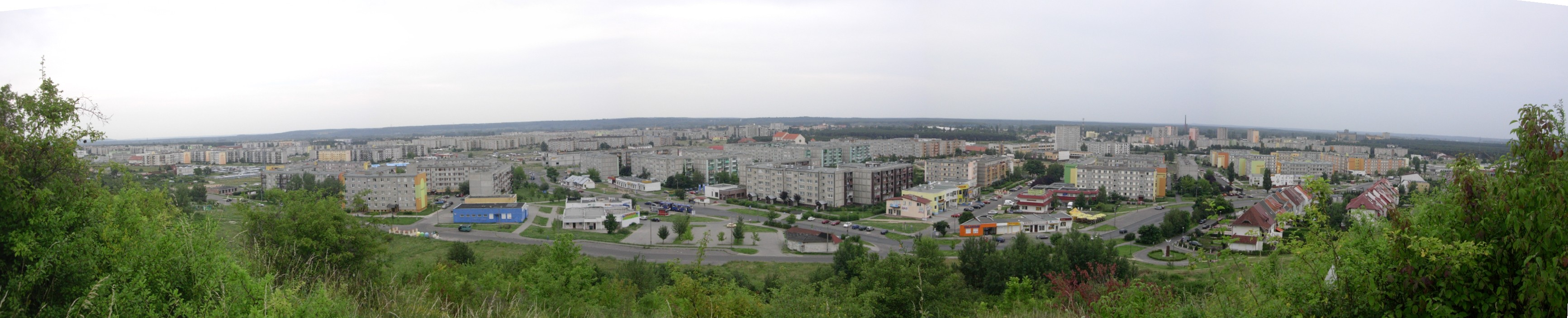 Widok na osiedla mieszkaniowe: Szybowników (w "centrum"), Stary Fordon (głęboki środek), Bajka (głębokie prawo), Tatrzańskie (lewo głębokie) oraz kawałek Osiedla nad Wisłą. Na fotografii można też dostrzec, wybudowany w latach 50. Elewator Zbożowy ("Reaktor"), dwa Ikarusy oraz Żuka.